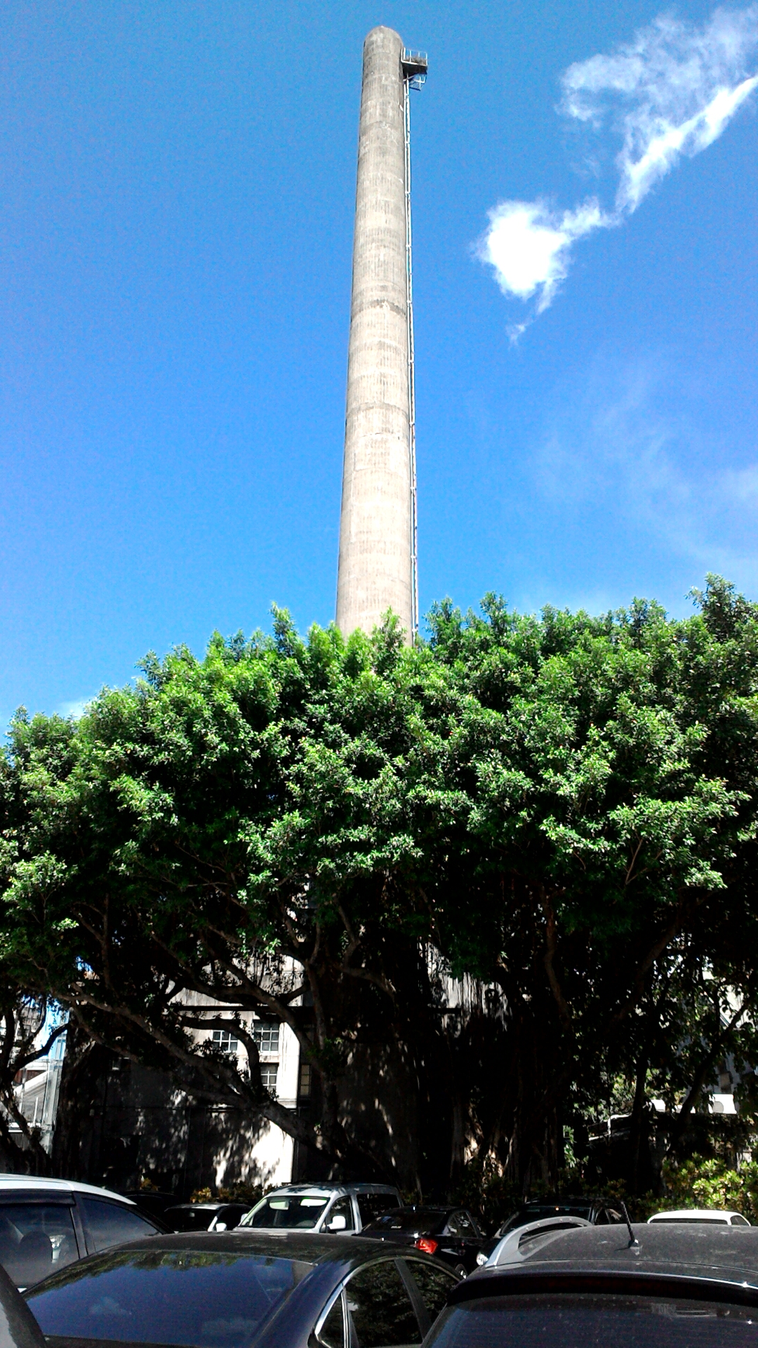 原臺北酒廠煙囪,台北市中正區東門次分區梅花里